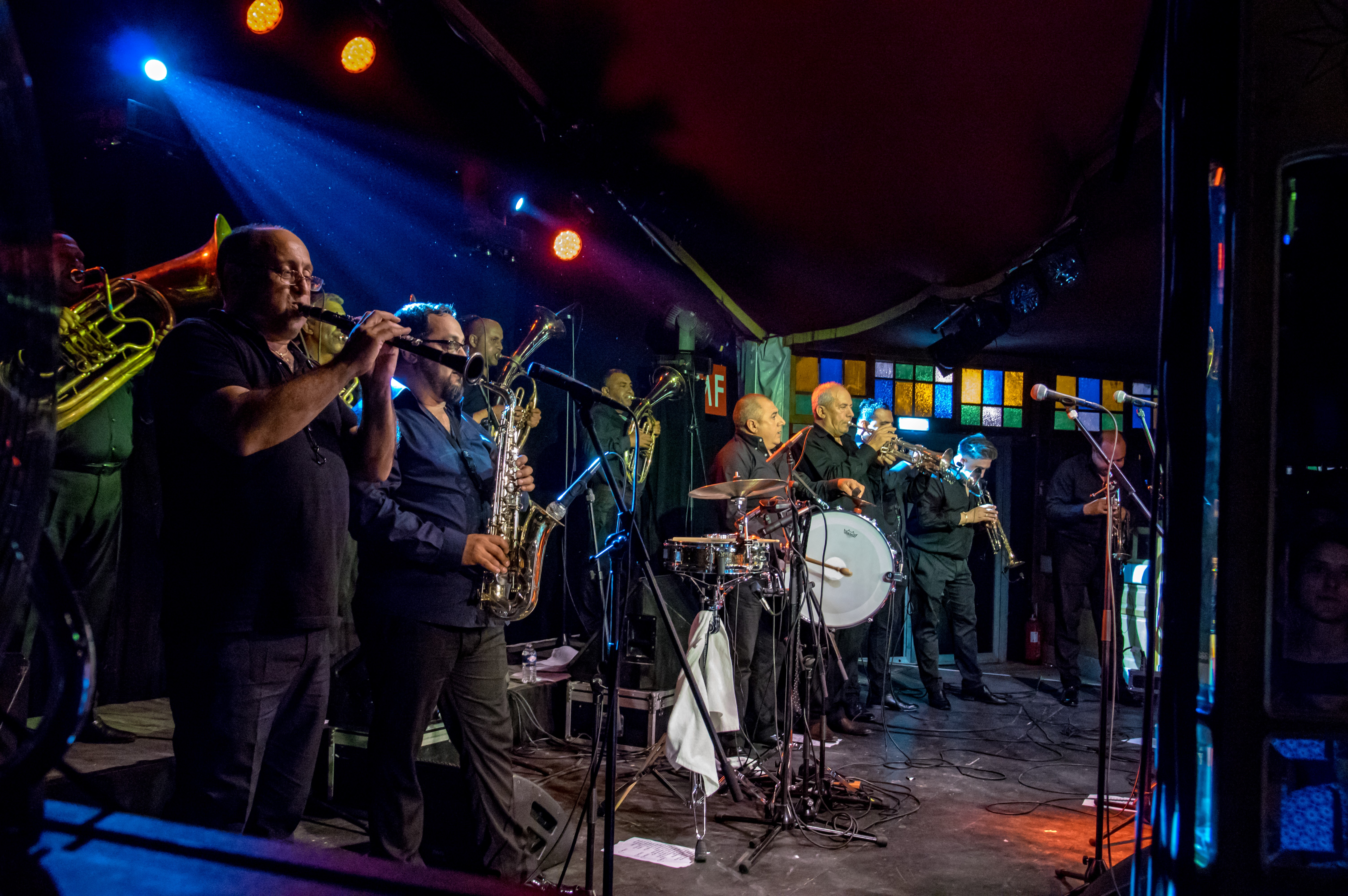 Bilder vom Zelt Musik Festival 2017 in Freiburg im Breisgau Fanfare Ciocarlia am 10.07.2017